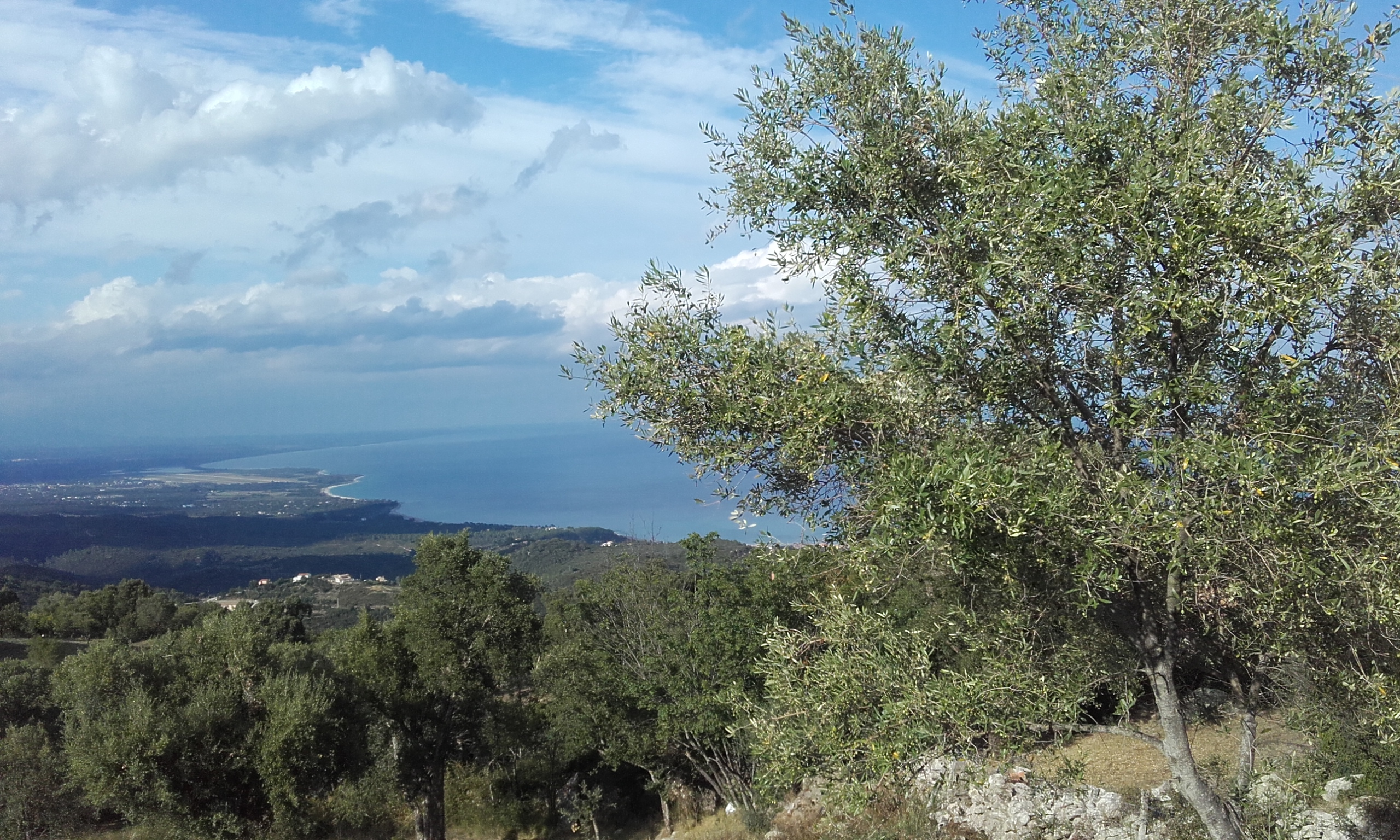 Sari-Solenzara (Corse), paysage avec vue sur mer.